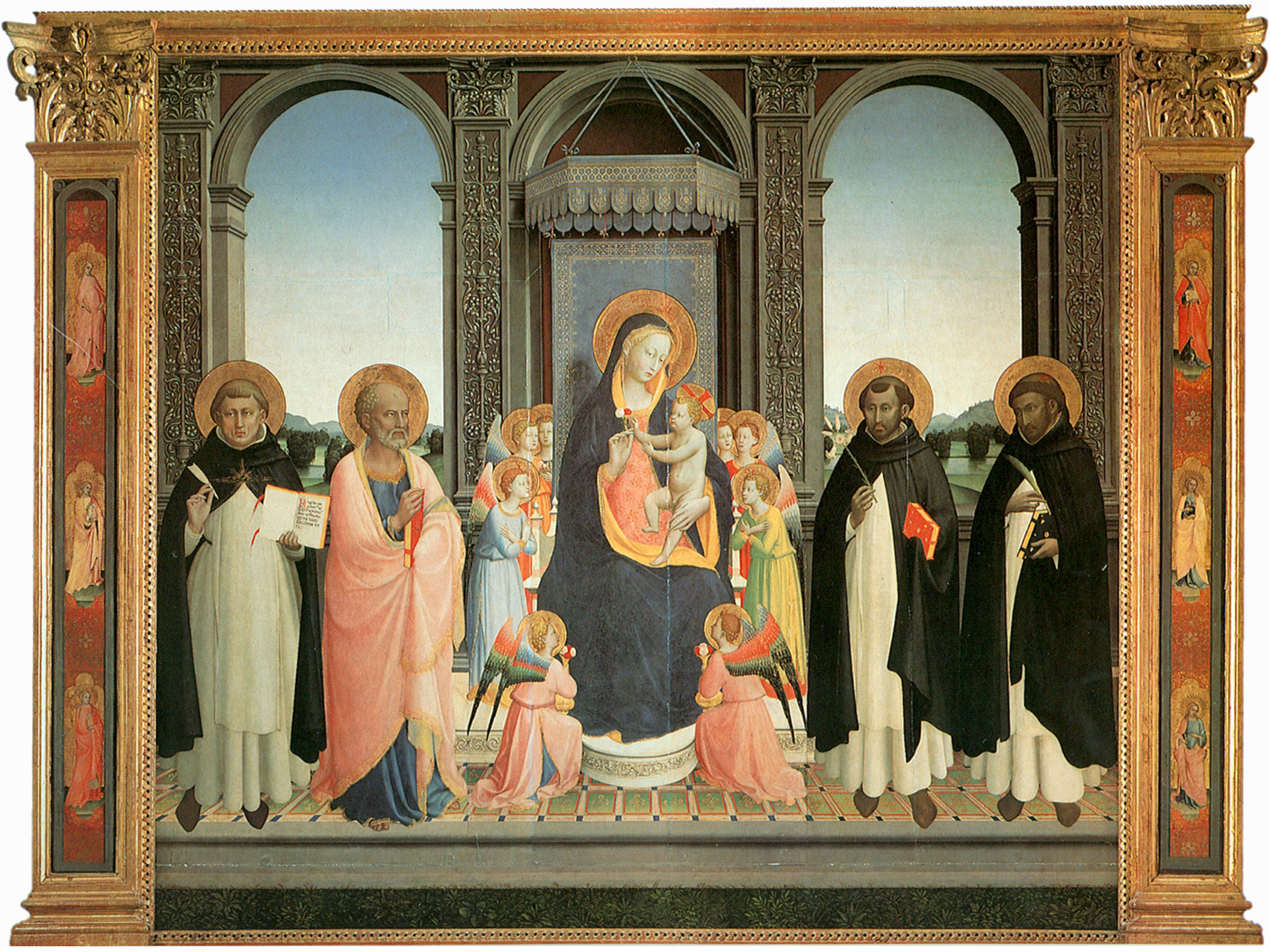 Fra Angelico Tempera on panel, 212 x 237cm Fiesole, San Domenico